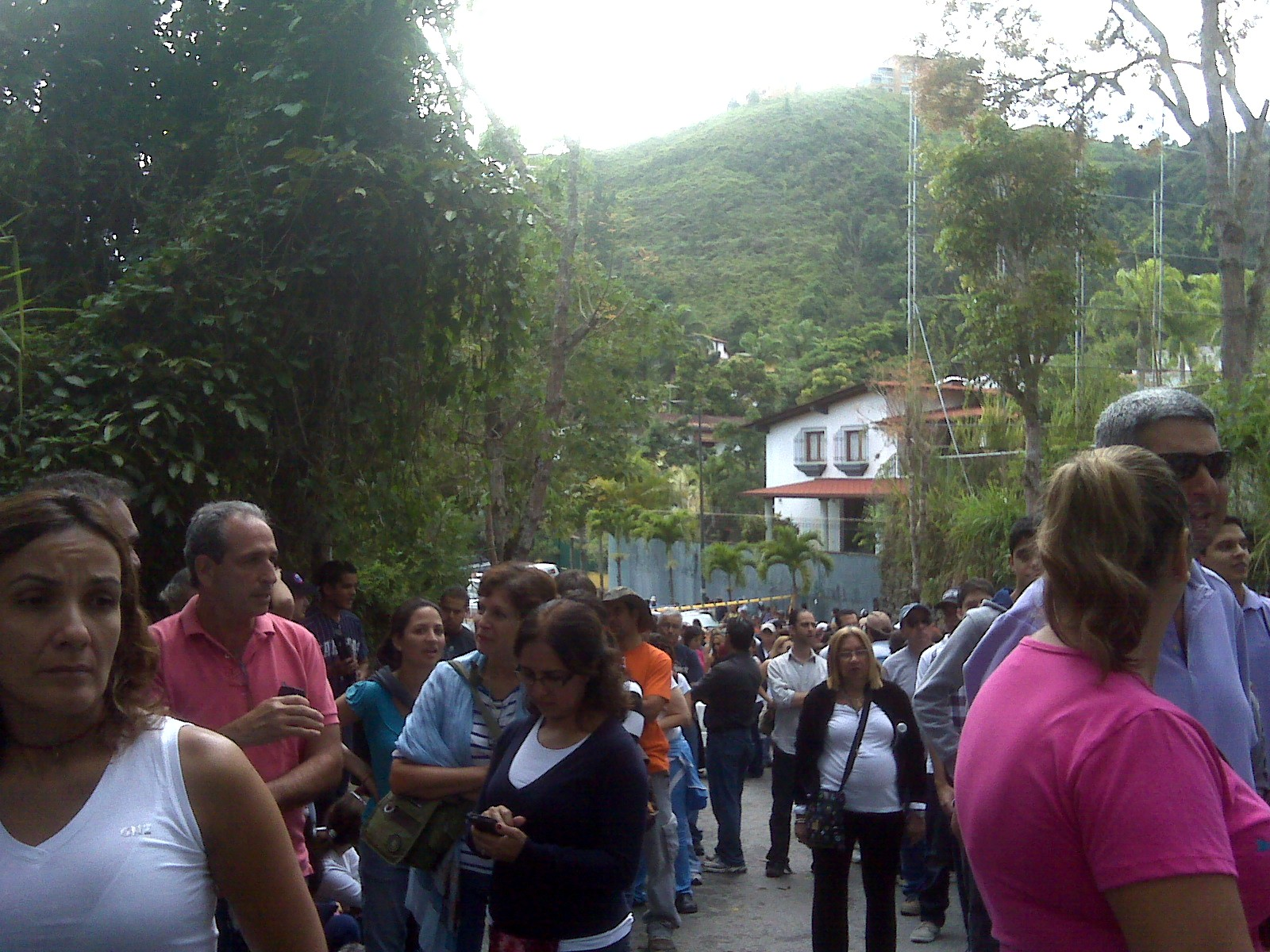 Colas para ingresar a las mesas de votación, en el centro de Votación Polideportivo La Boyera en Boyera municipio El Hatillo, estado Miranda Venezuela durante las Elecciones presidenciales de Venezuela de 2012.